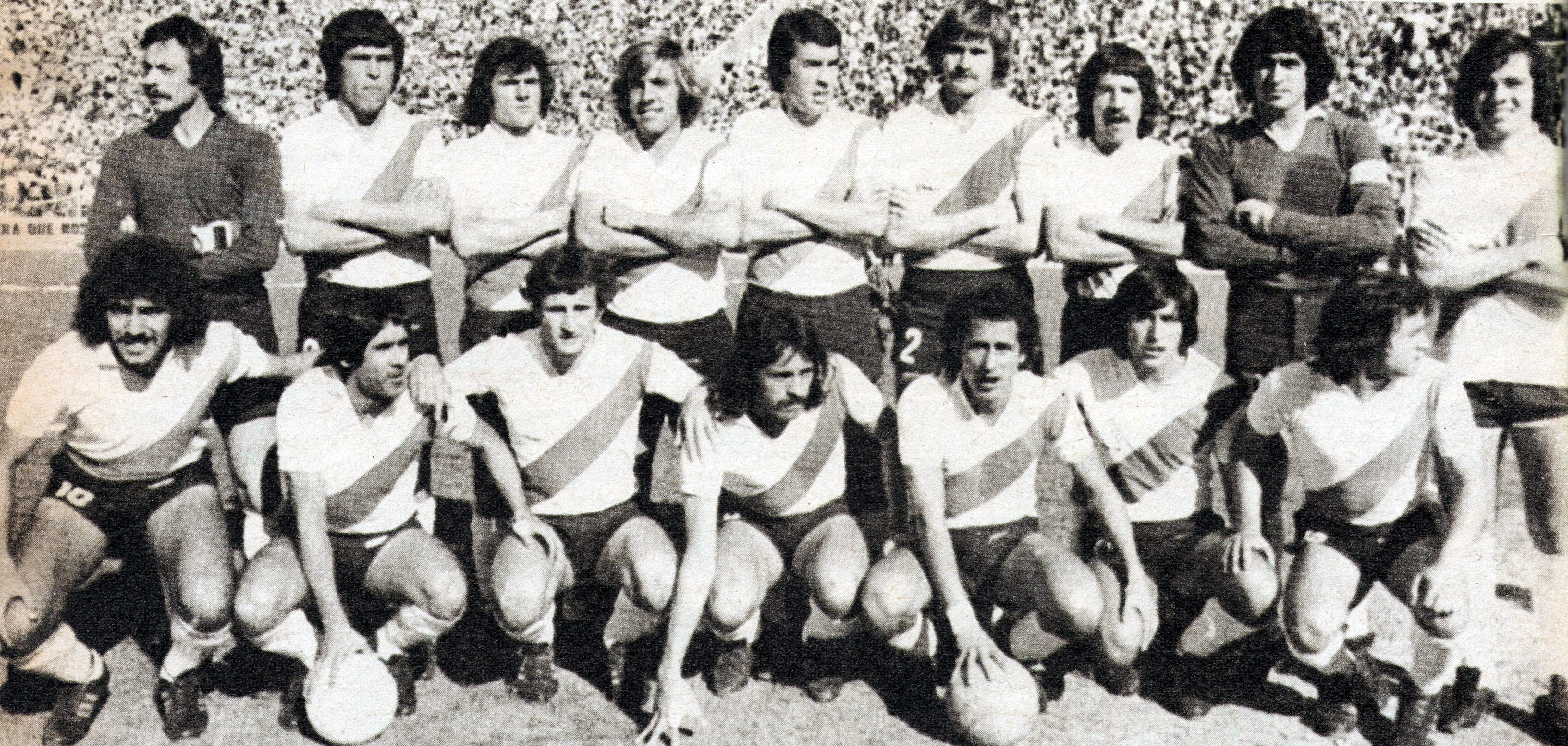 Formación de River Plate en el último partido del Campeonato Metropolitano argentino del año 1977 donde venció al Club Ferro Carril Oeste por 4 a 2. Partido disputado en el estadio de Huracán.